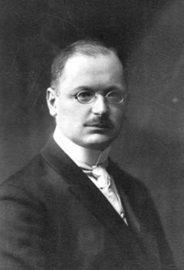 Friedrich Rudolf Schenck (* 11. März 1870 in Halle (Saale); † 28. März 1965 in Münster (Westfalen))